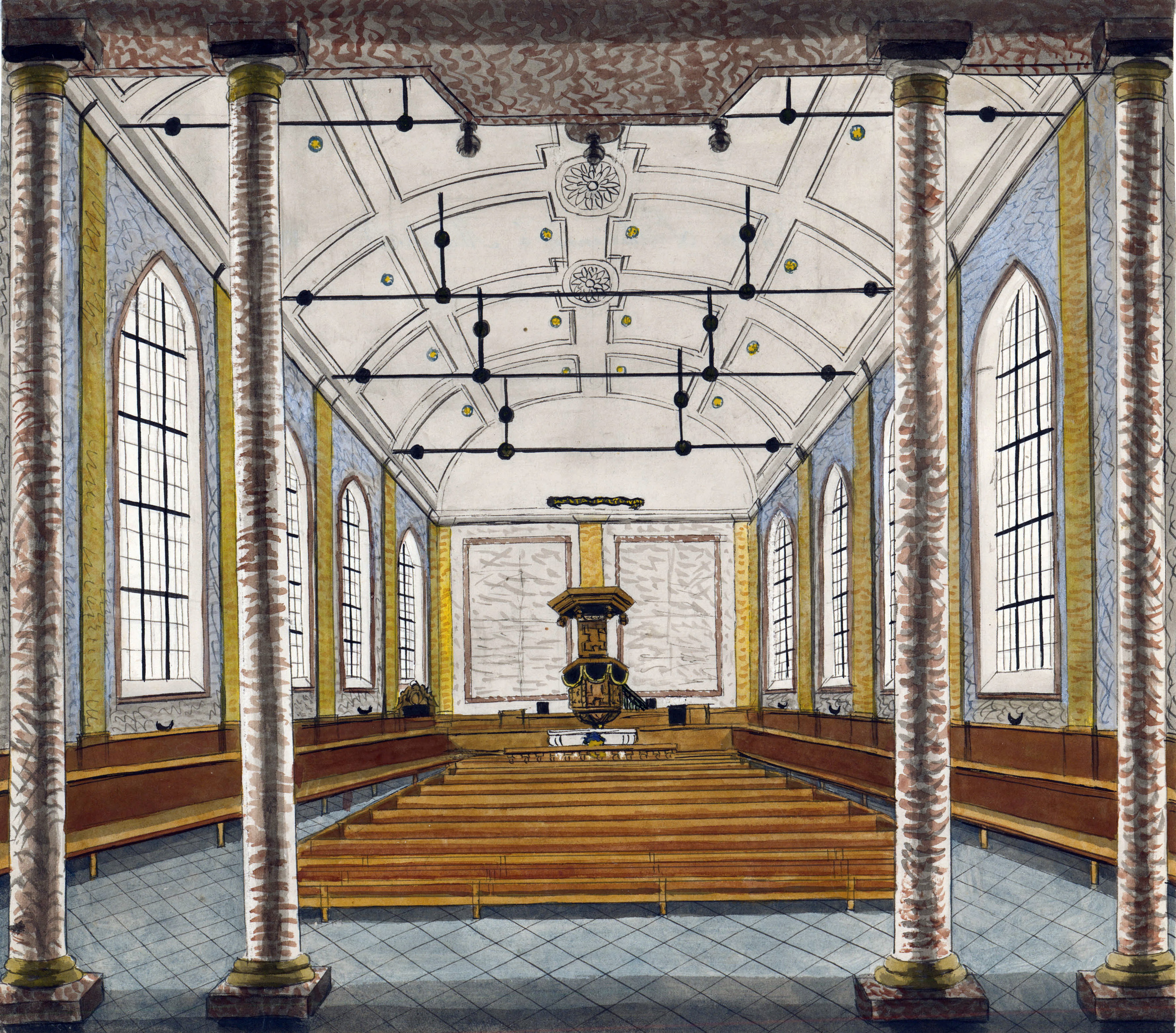 Tekening van Philippe van Gulpen van het interieur van de Lutherse Kerk in Maastricht. Op de achterkant: "Eglise Lutherienne à Maestricht". Collectie Van der Noordaa in het RHCL, Maastricht, CVDN 99